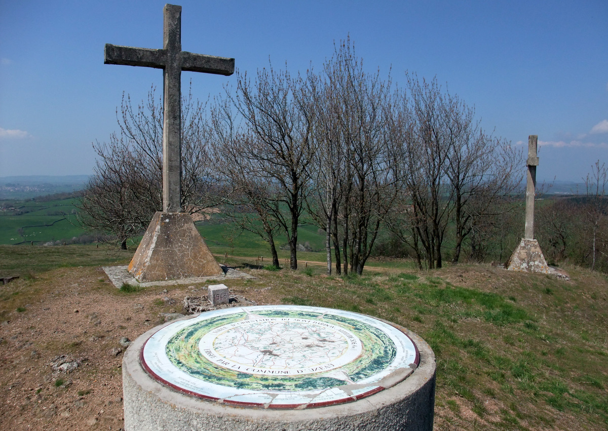 La table d'orientation et deux des trois croix situés au sommet du mont Dardon.